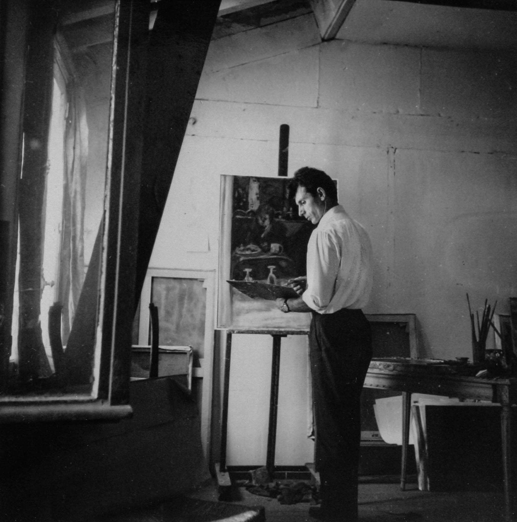 portrait